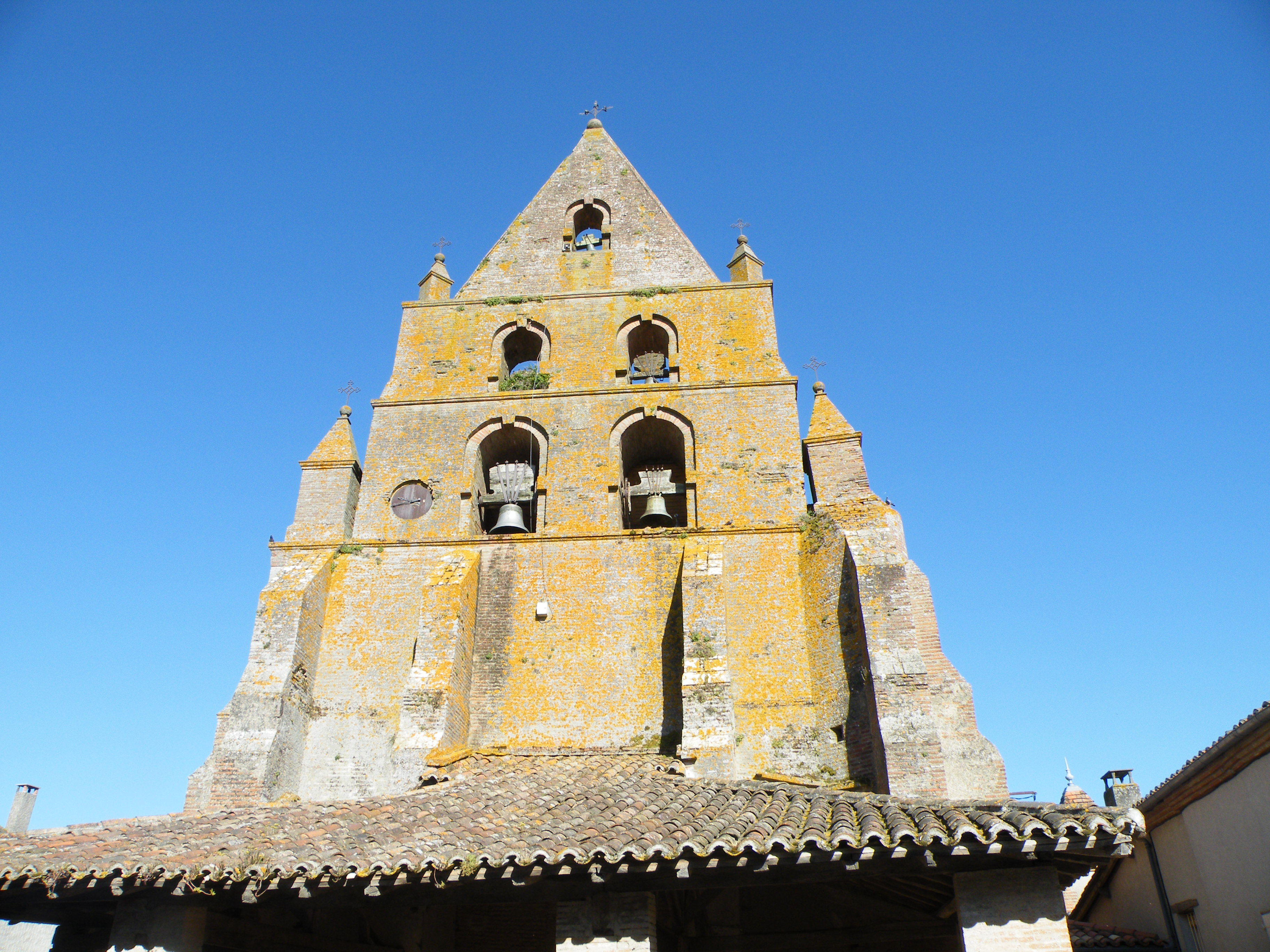 This building is en partie classé, en partie inscrit au titre des Monuments Historiques. .